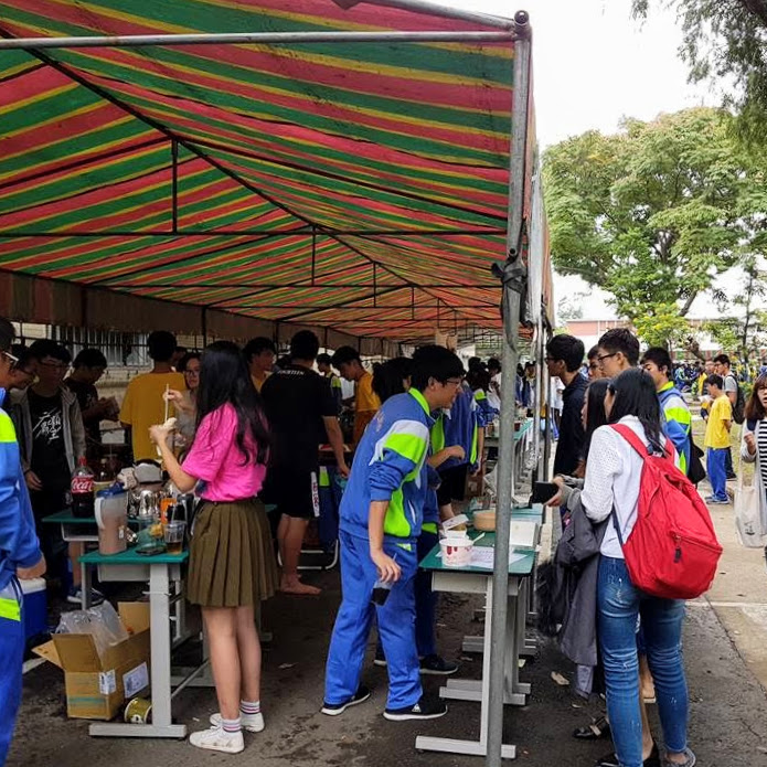 中文（台灣）: 2017年，武陵高中舉辦園遊會的一景。